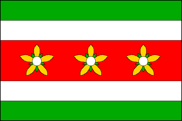 vlajka,Prosečné , okres Trutnov